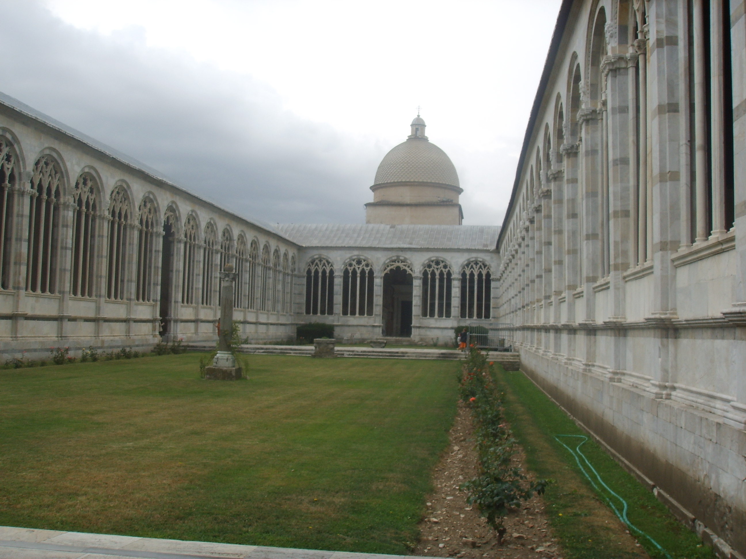 Monumental Camposanto (graveyard) in Pisa, Italy